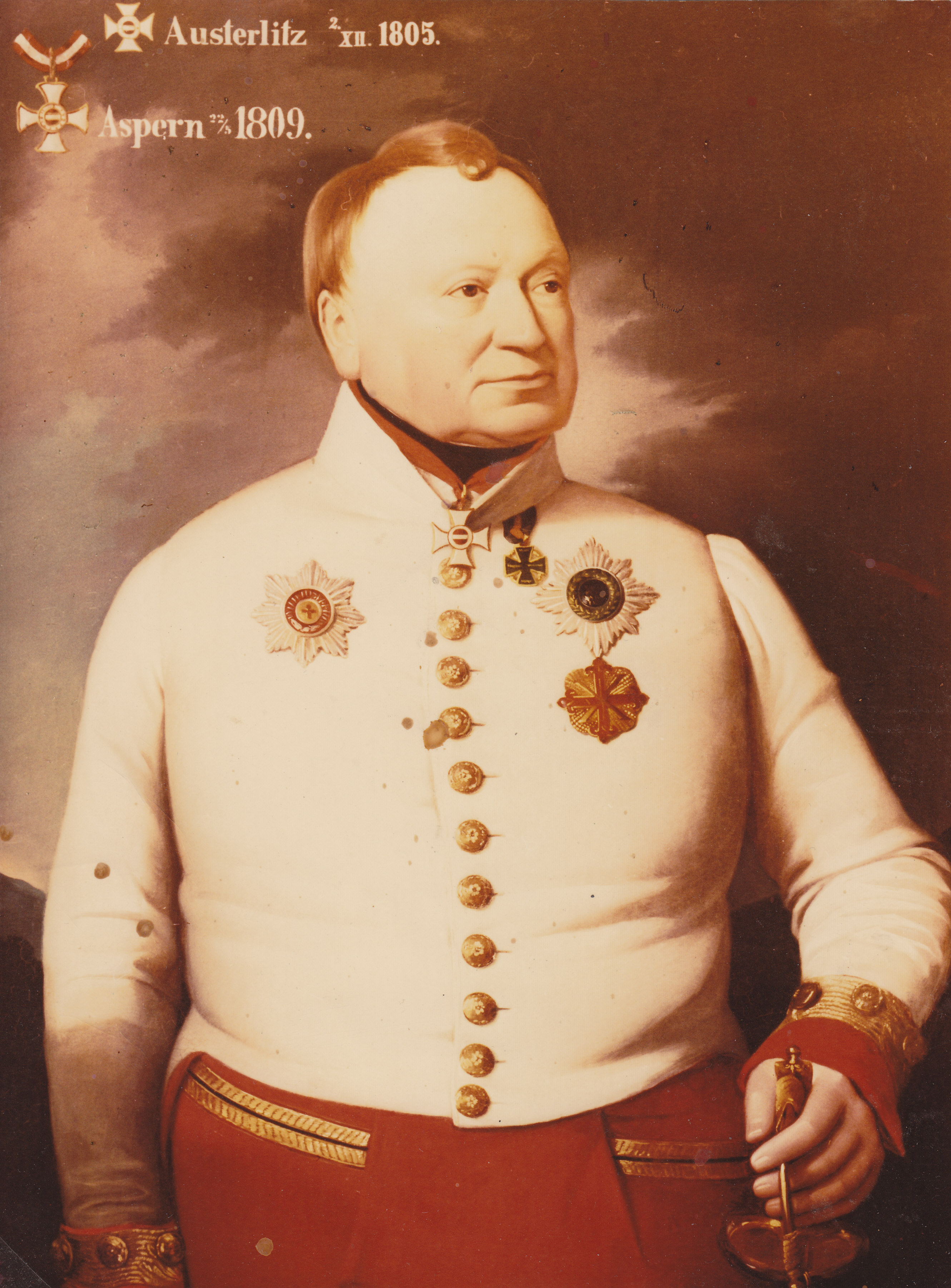 Maximilian von Wimpffen (1770-1854), général et feld-maréchal autrichien.